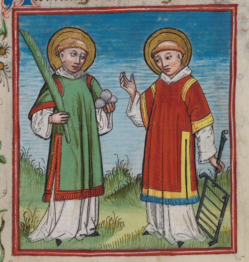 Hl. Stephan und hl. Laurentius; Detail aus dem Waldburg-Gebetbuch, WLB Stuttgart, Cod. brev. 12, fol. 63v